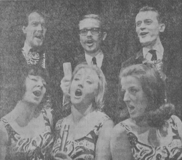 Sånggruppen Gals and Pals, det vill säga (övre raden) Svante Thuresson, Lasse Bagge, Beppo Gräsman samt (undre raden) Kerstin Bagge, Pia Lang och Ulla Hallin.